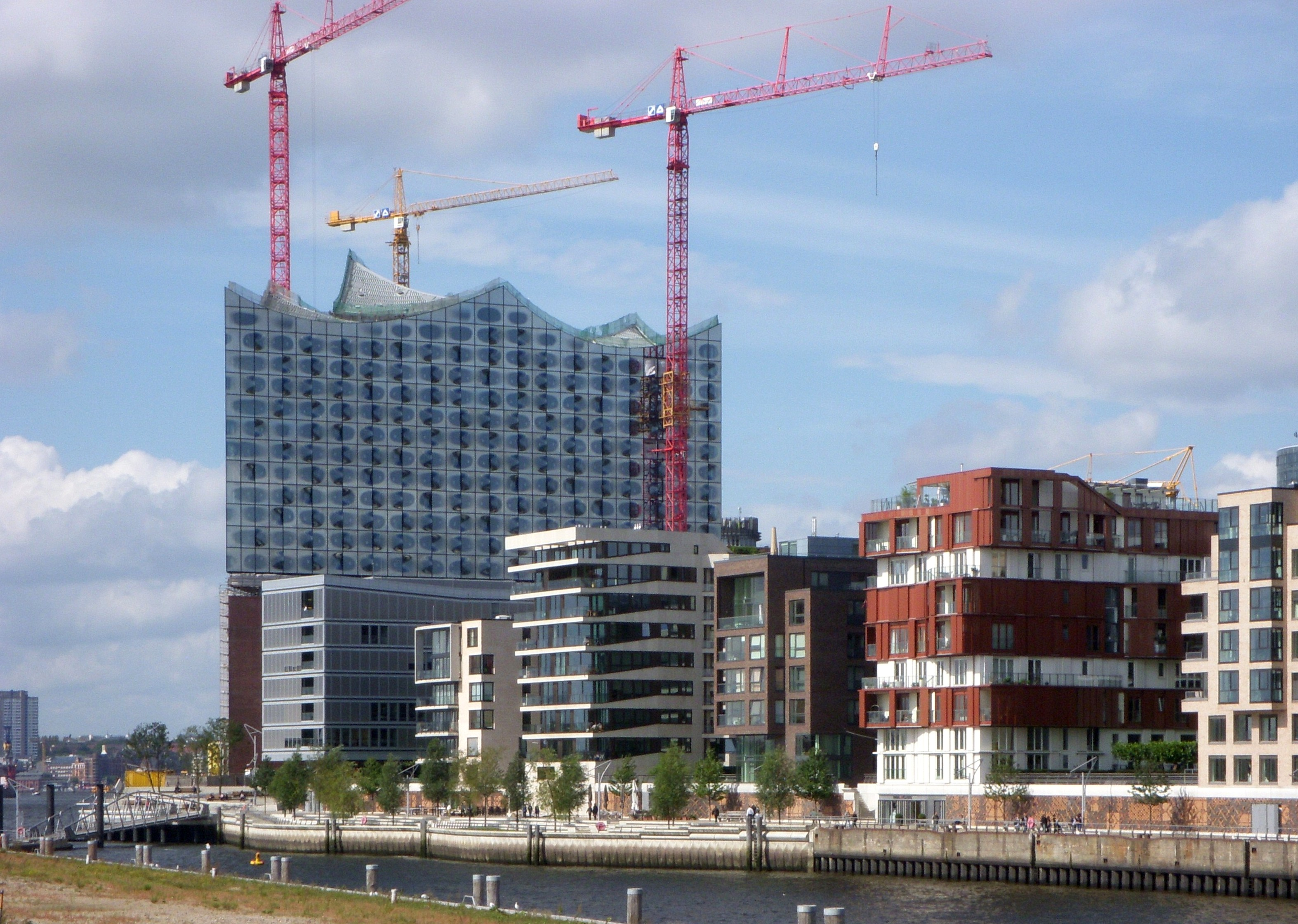 Elbphilharmonie mit Grasbrookhafen, Hamburg, September 2011